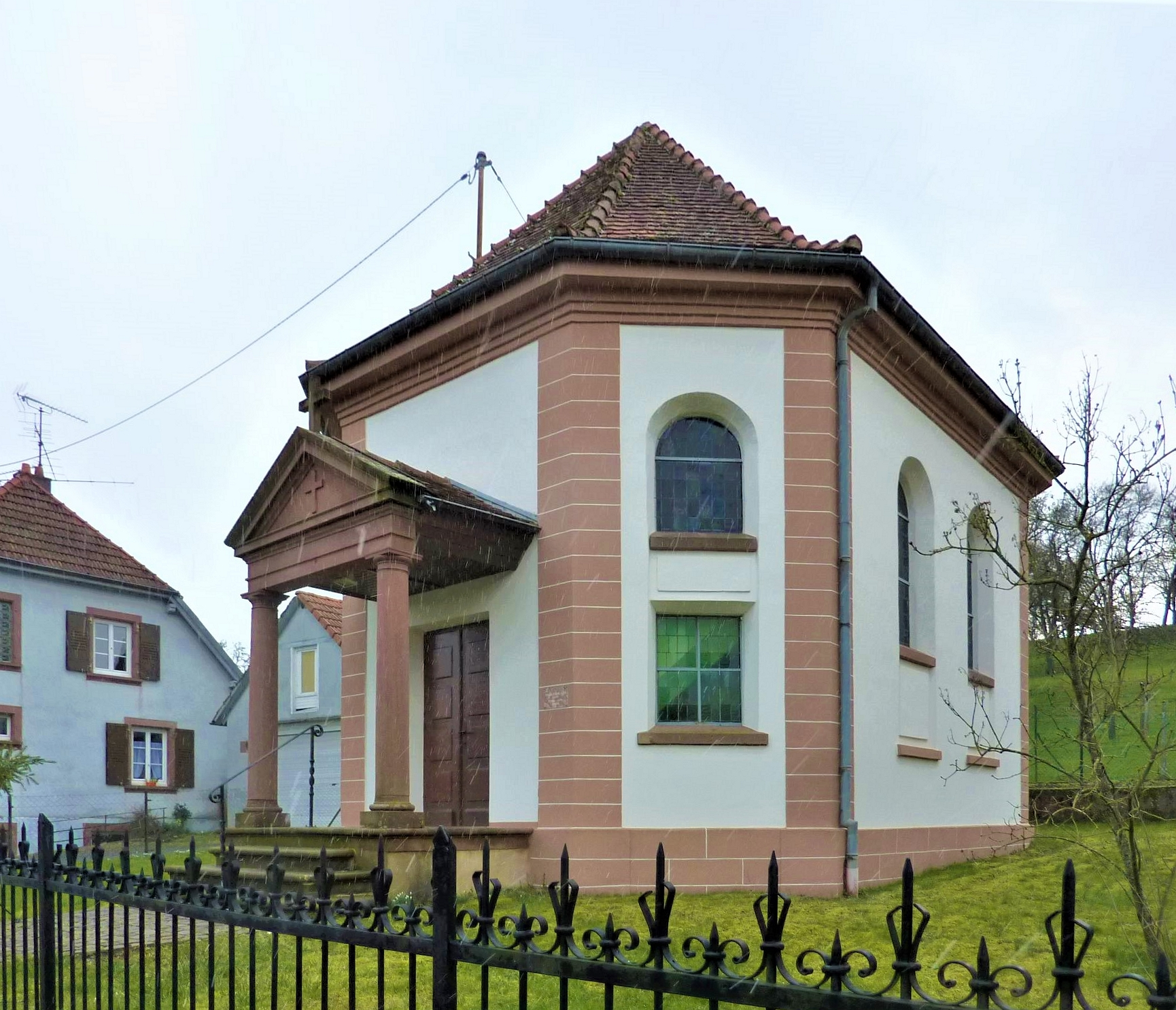 Église Saint-Paul de Lembach